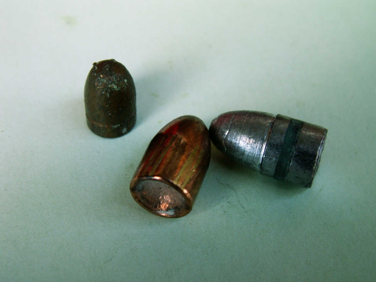 Primeri pištolskih krogel. Polnooplaščeni krogli kalibrov 9 mm in 7,65 ter neoplaščena krogla (svinčenka) 9 mm.